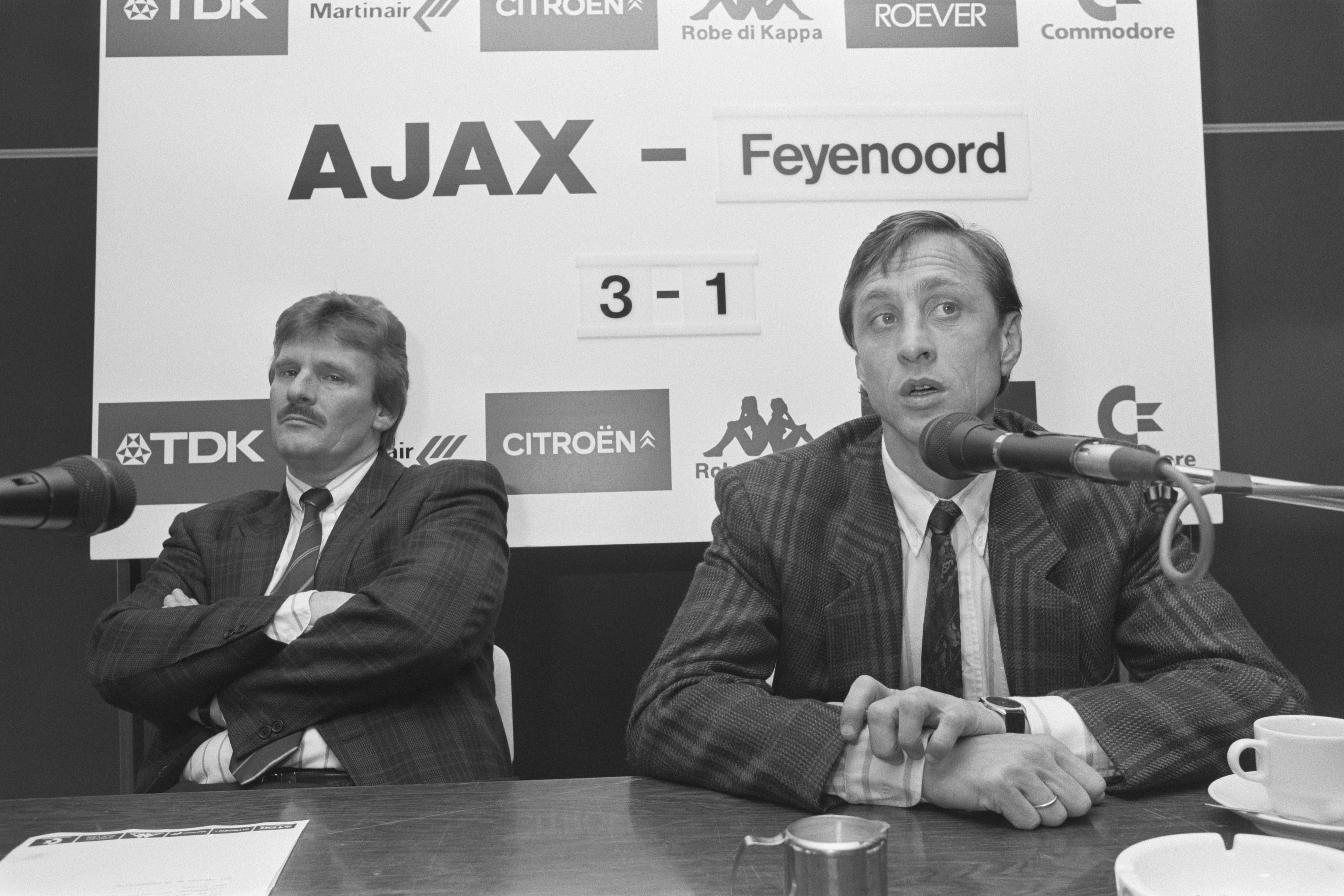 Collectie / Archief : Fotocollectie Anefo Reportage / Serie : [ onbekend ] Beschrijving : Training Ajax, Cruijff (r) en algemeen directeur Arie van Eijden tijdens persconferentie Datum : 2 november 1987 Trefwoorden : directeuren, persconferenties, sport, voetbal Persoonsnaam : Arie van Eijden, Cruijff, Johan Fotograaf : Molendijk, Bart / Anefo Auteursrechthebbende : Nationaal Archief Materiaalsoort : Negatief (zwart/wit) Nummer archiefinventaris : bekijk toegang 2.24.01.05 Bestanddeelnummer : 934-1215